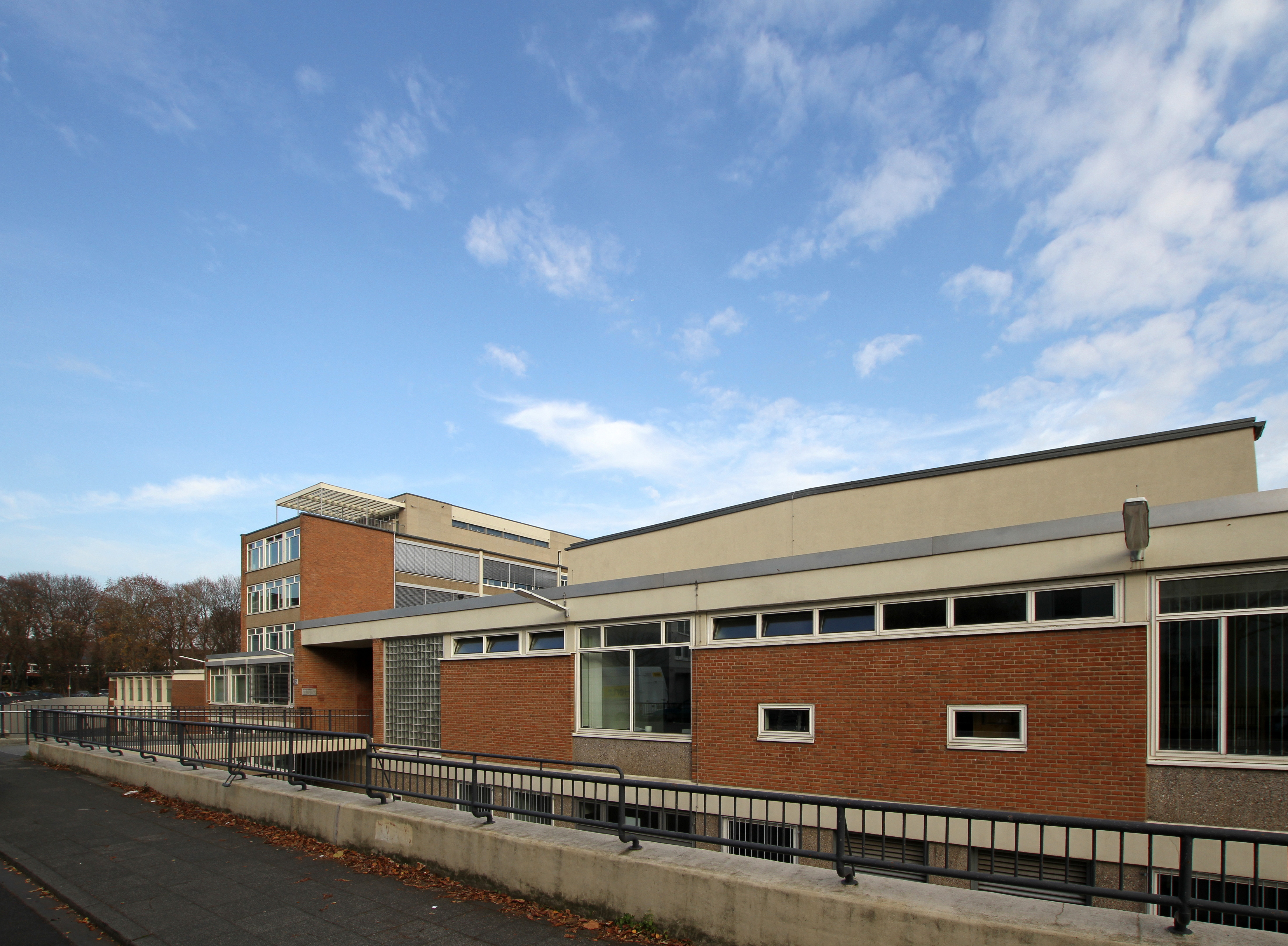 Apostelgymnasium in Köln-Lindenthal, Haupteingang Biggestr. 2